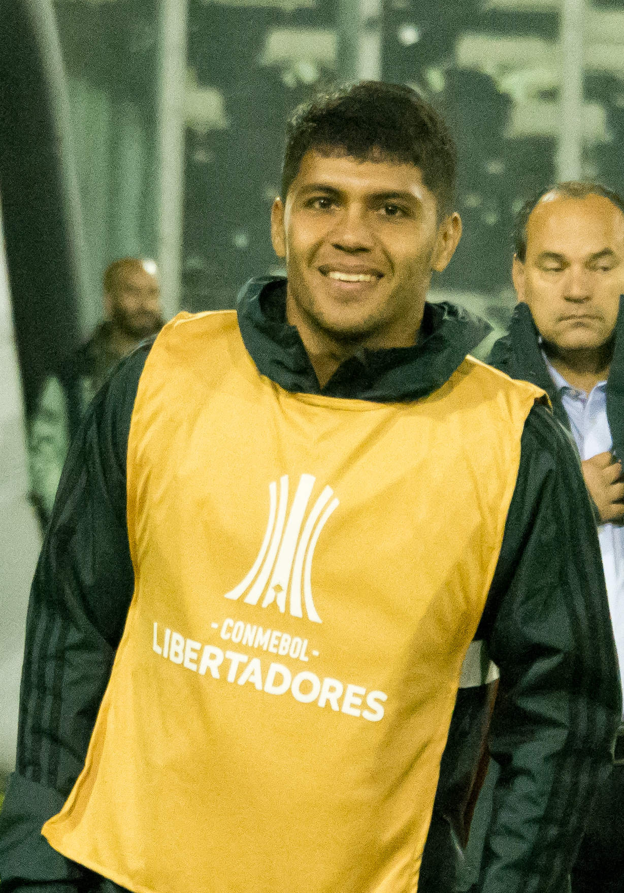 Palestino v River Plate, Estadio Monumental, Macul, Santiago, Región Metropolitana, Chile.